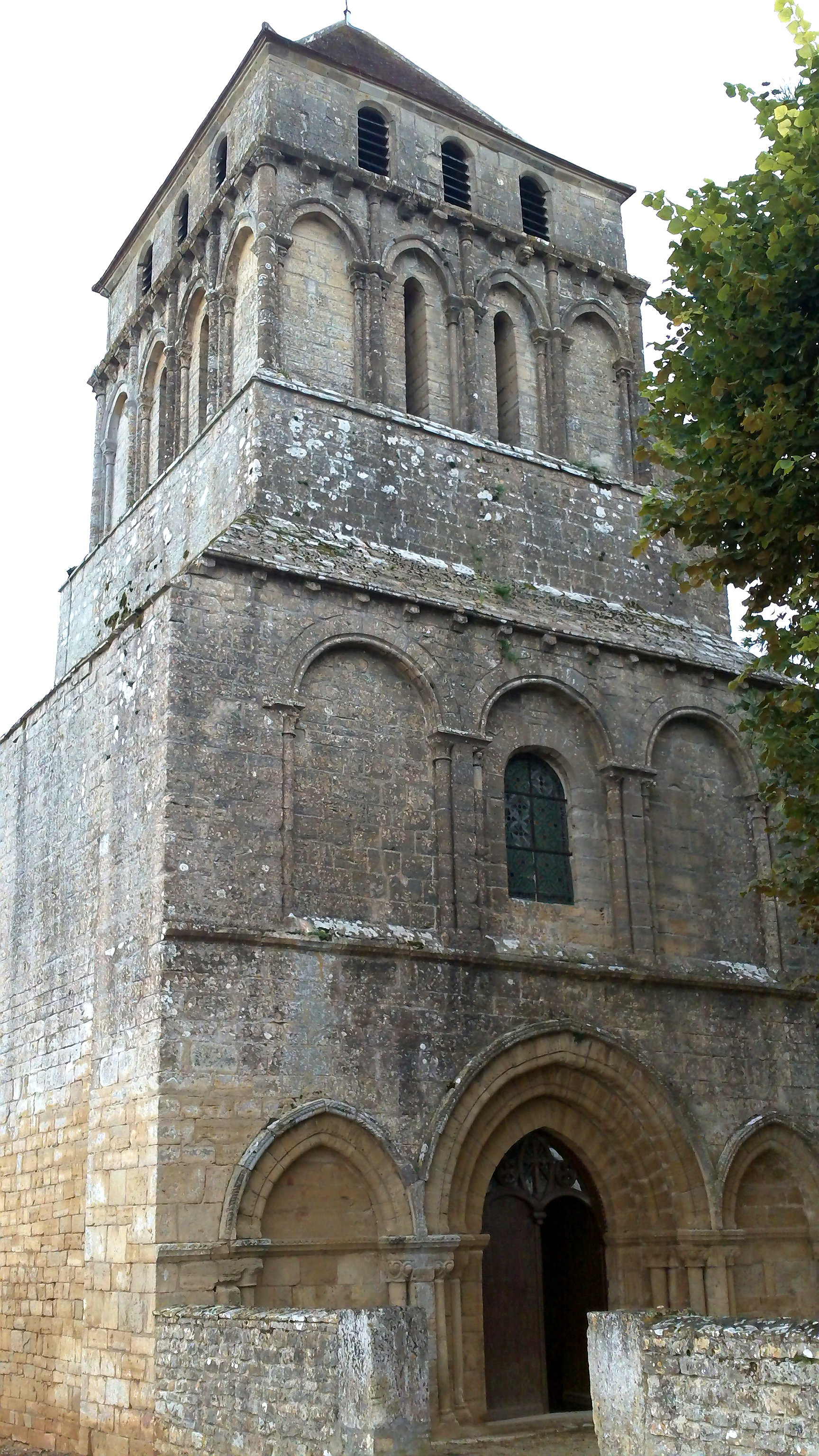 Eglise de Clussaie la Pommeraie- XIIe siècle